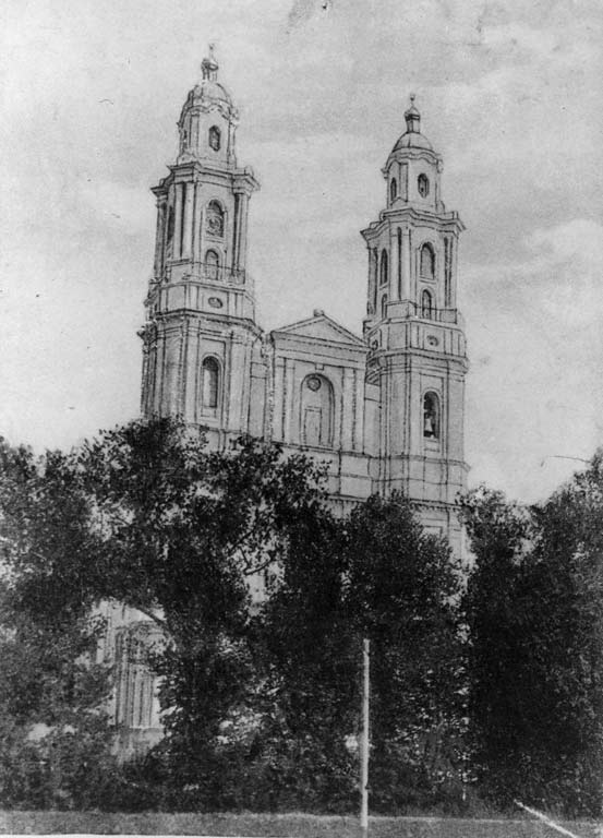 Беларуская (тарашкевіца): Дынабург (Dynaburg). Касьцёл і калегіюм езуітаў